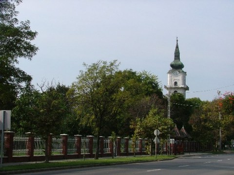 Szeghalom, református templom messziről.